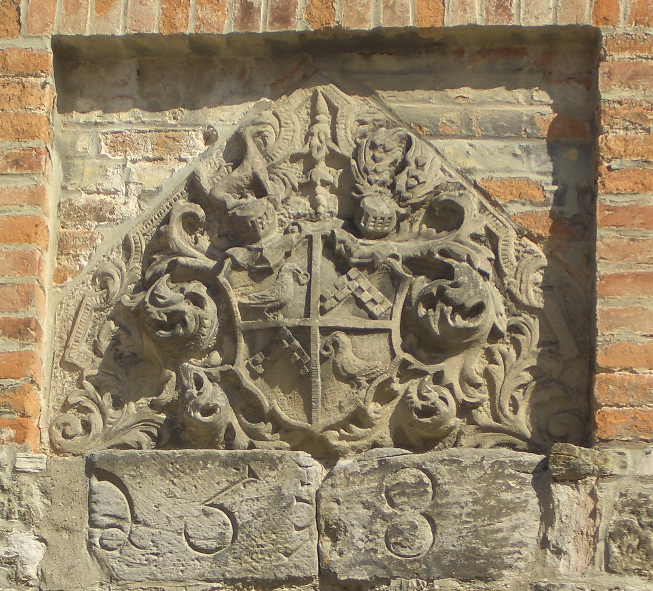 Barockes Familienwappen der Herren von Trotha und die Jahreszahl (158...) im Hof der Würdenburg